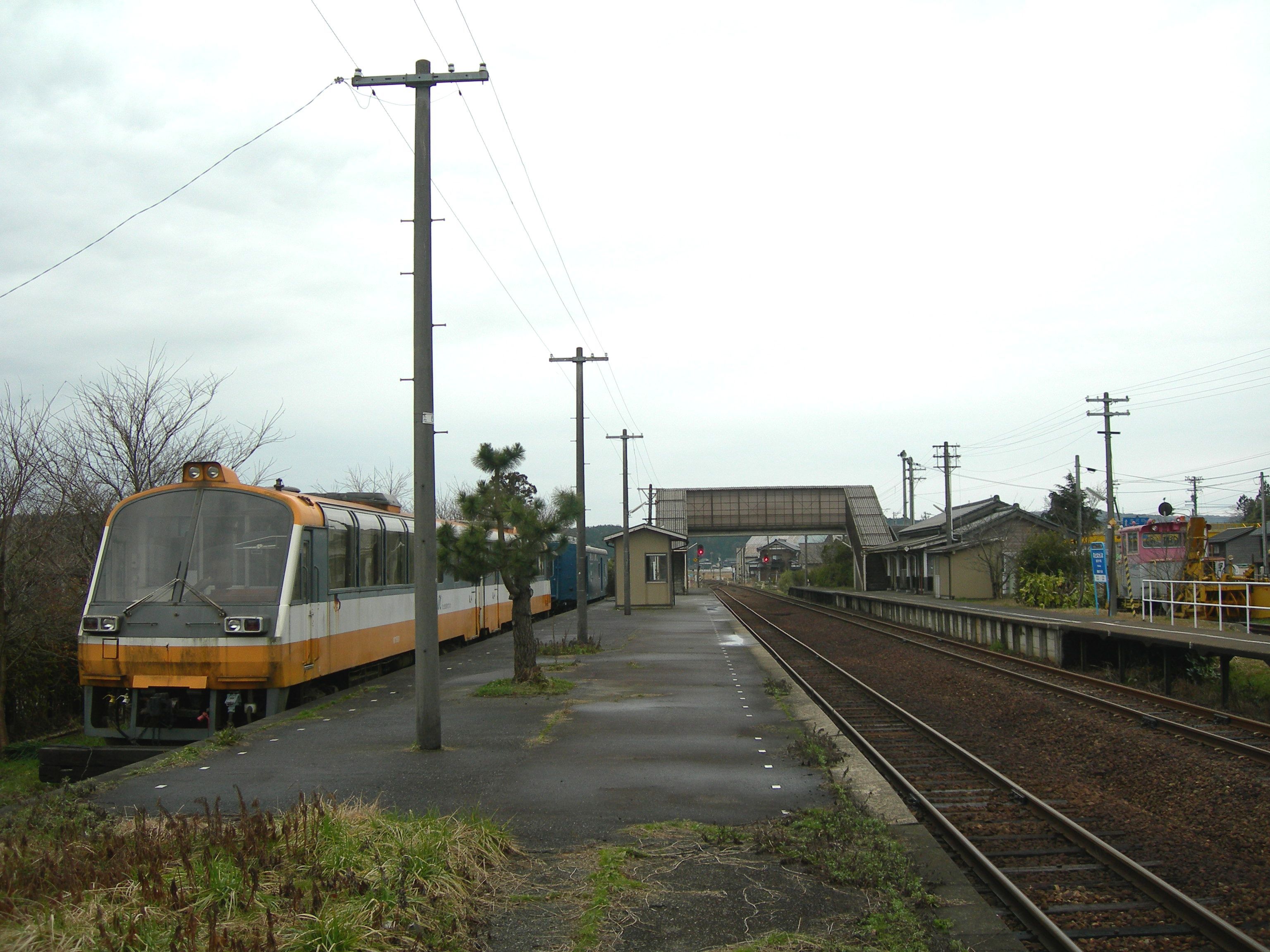 のと鉄道 能登中島駅ホーム